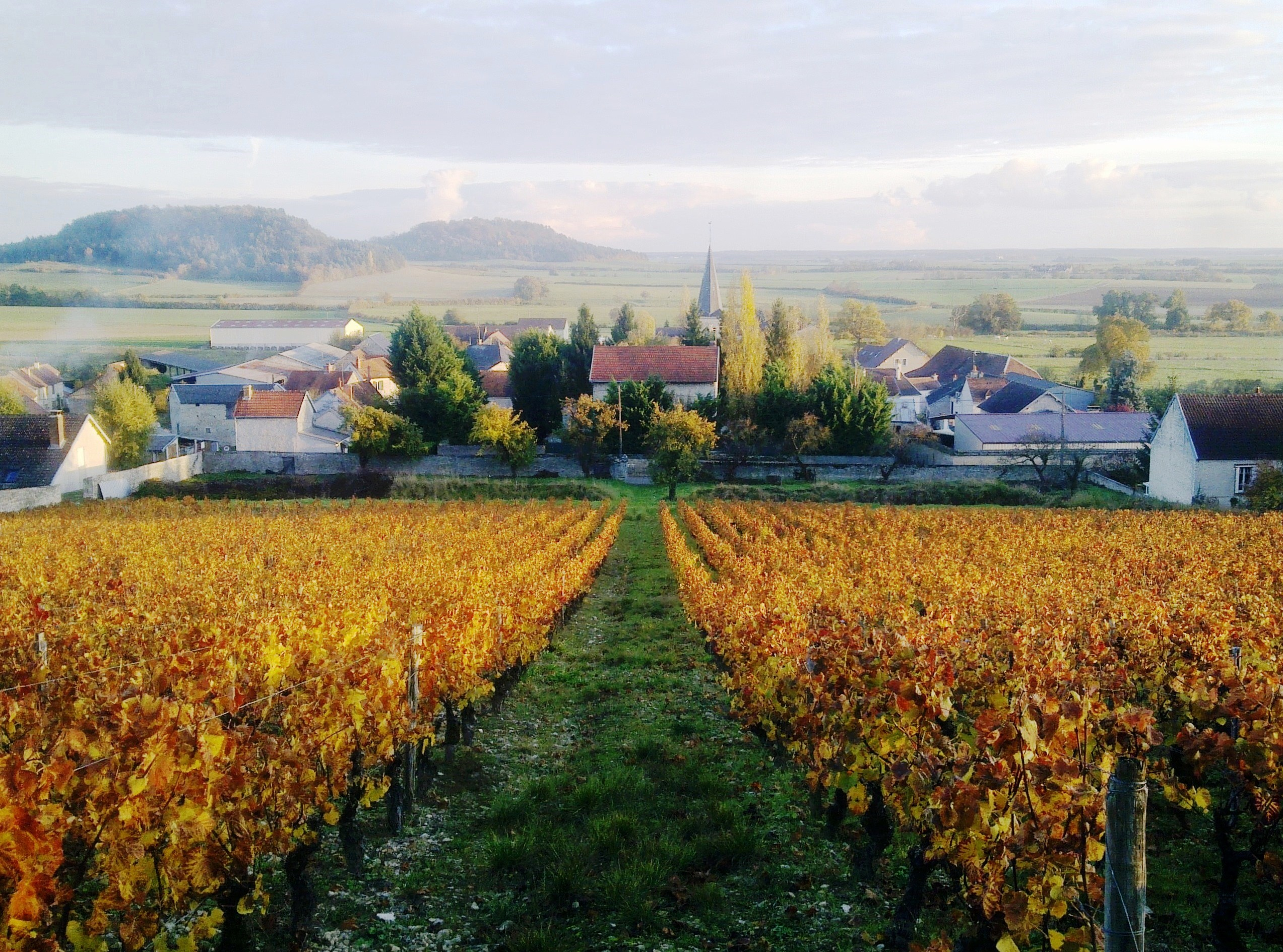 Village de Massingy (Côte-d'Or) depuis le clos Notre-Dame